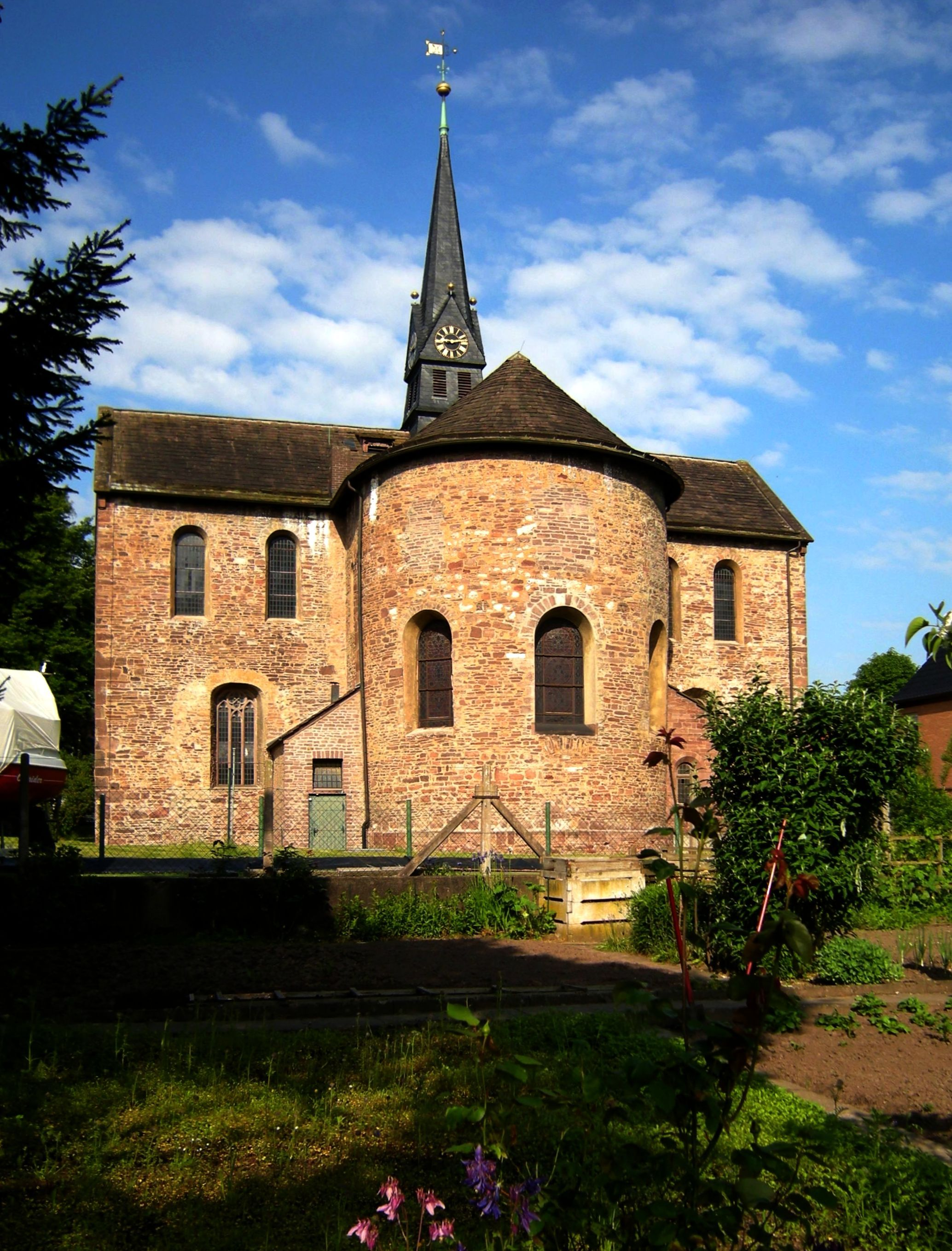 Bodenwerder-Kloster Kemnade um 1000.jpg